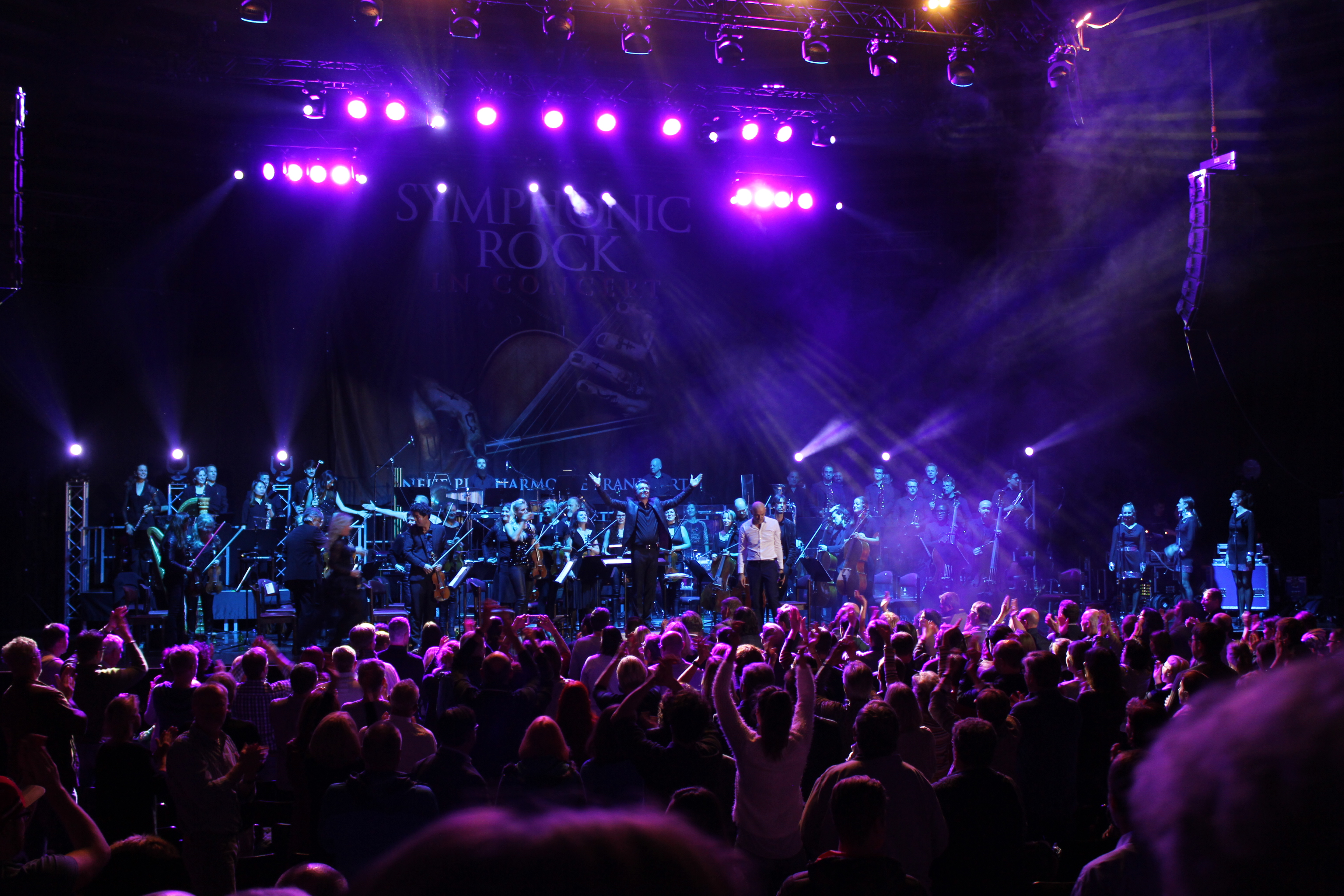 Standing Ovations nach einer eigenen Crossover-Produktion